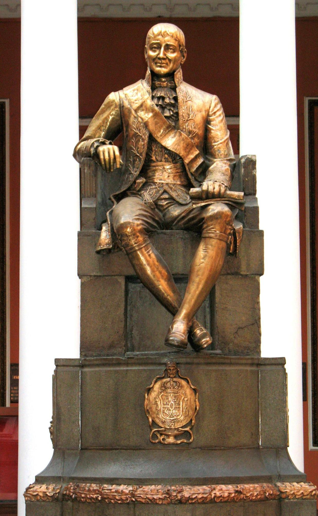 Escultura en bronce de José Hipólito de Unanue Pavón, en el patio de la sede administrativa de la Facultad de Medicina de la Universidad Nacional Mayor de San Marcos "San Fernando" en honor a su dedicada labor para con la facultad y la sociedad peruana.